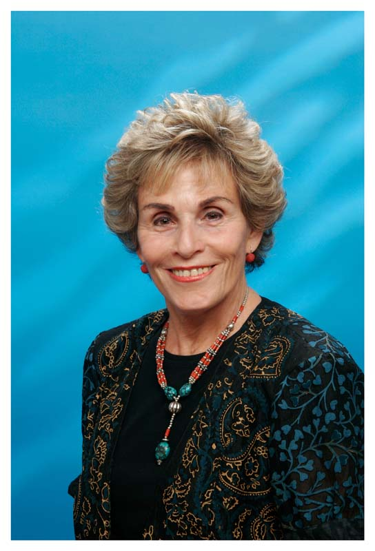 פרופ' זהרה יניב